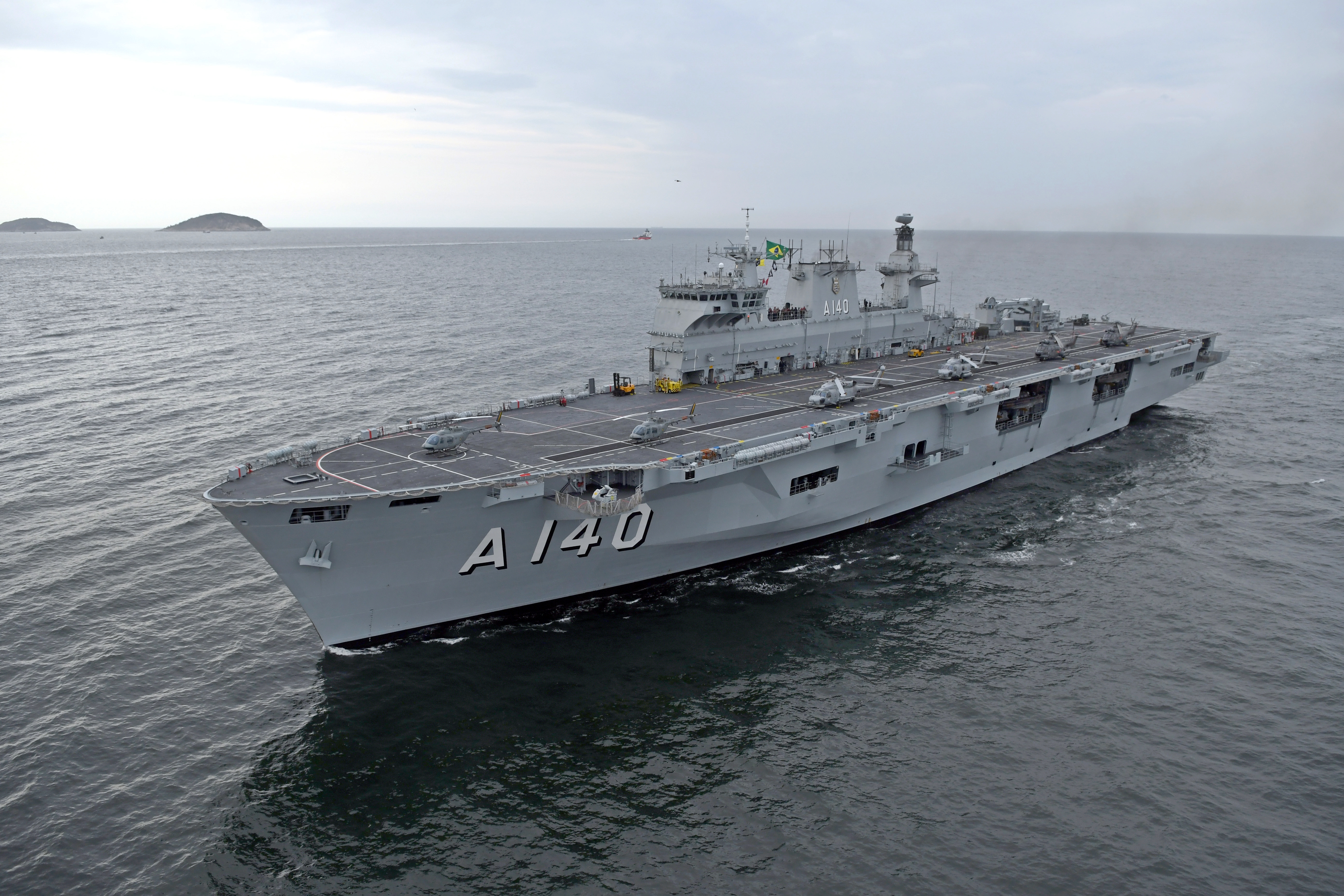 Crédito: Alexandre Durão/Revista Força Aérea Arquivo liberado pela Marinha do Brasil através de projeto GLAM com Wiki Educação Brasil